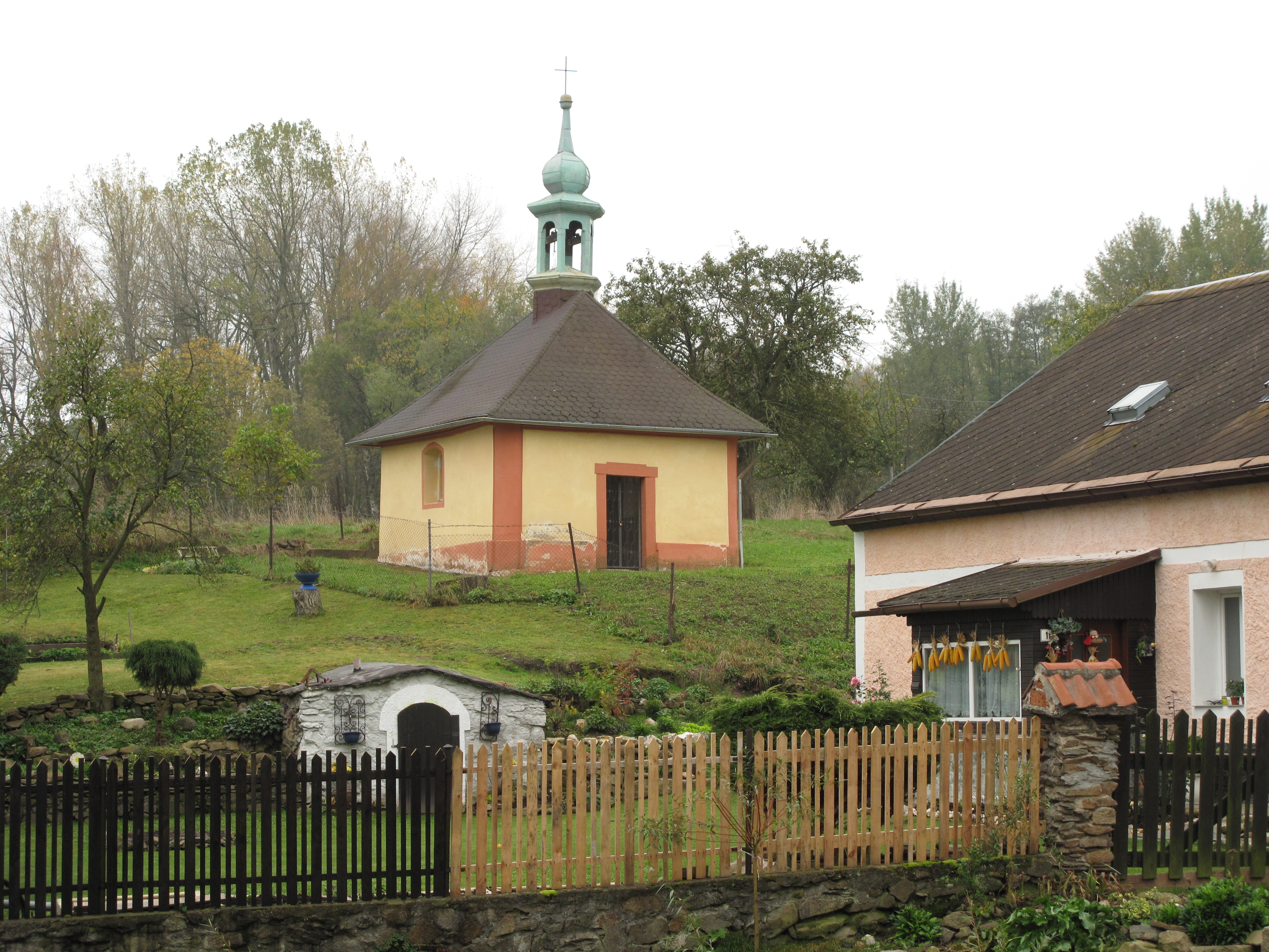 Kaplička v Knínicích. Okres Karlovy Vary, Česká republika.